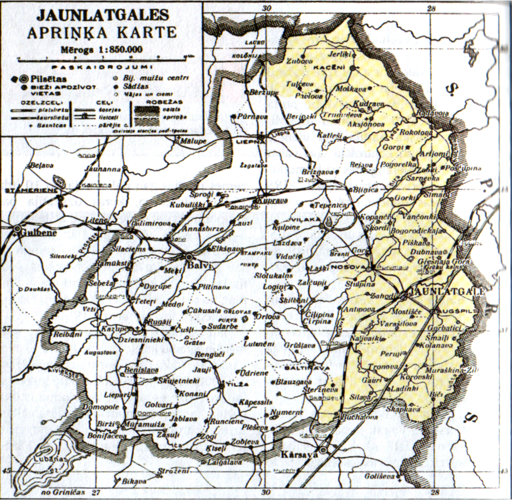 Яунлатгальский уезд. Жёлтым обозначена его территория, возвращённая в состав РСФСР в 1945 году как Пыталовский и Качановский районы